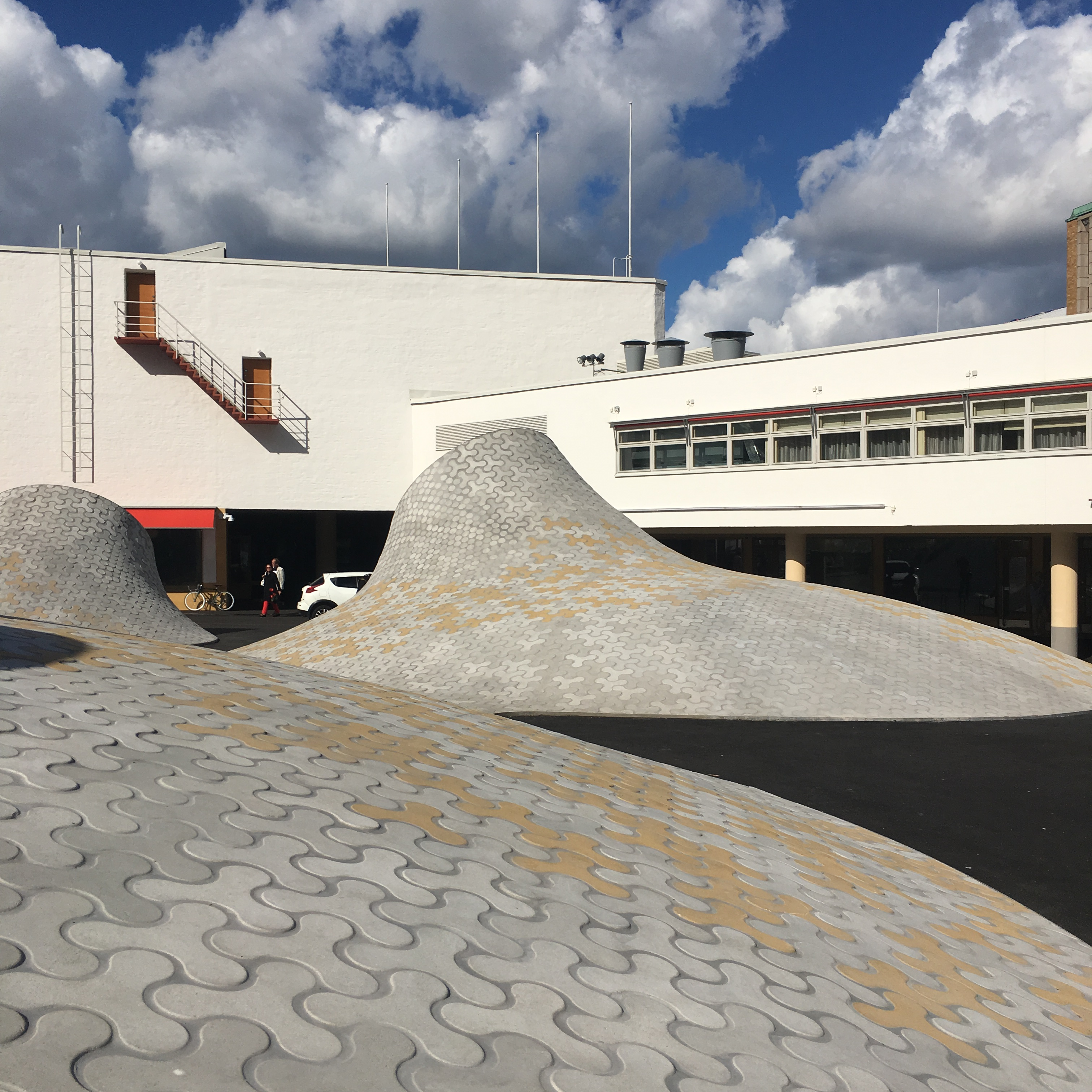 Lasipalatsi ja Amos Rexin kattoikkunat